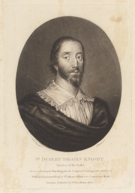 Sir Dudley Digges (c1583-1639)